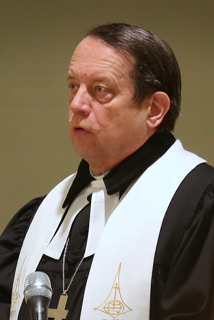 Gáncs Péter evangélikus lelkész, püspök